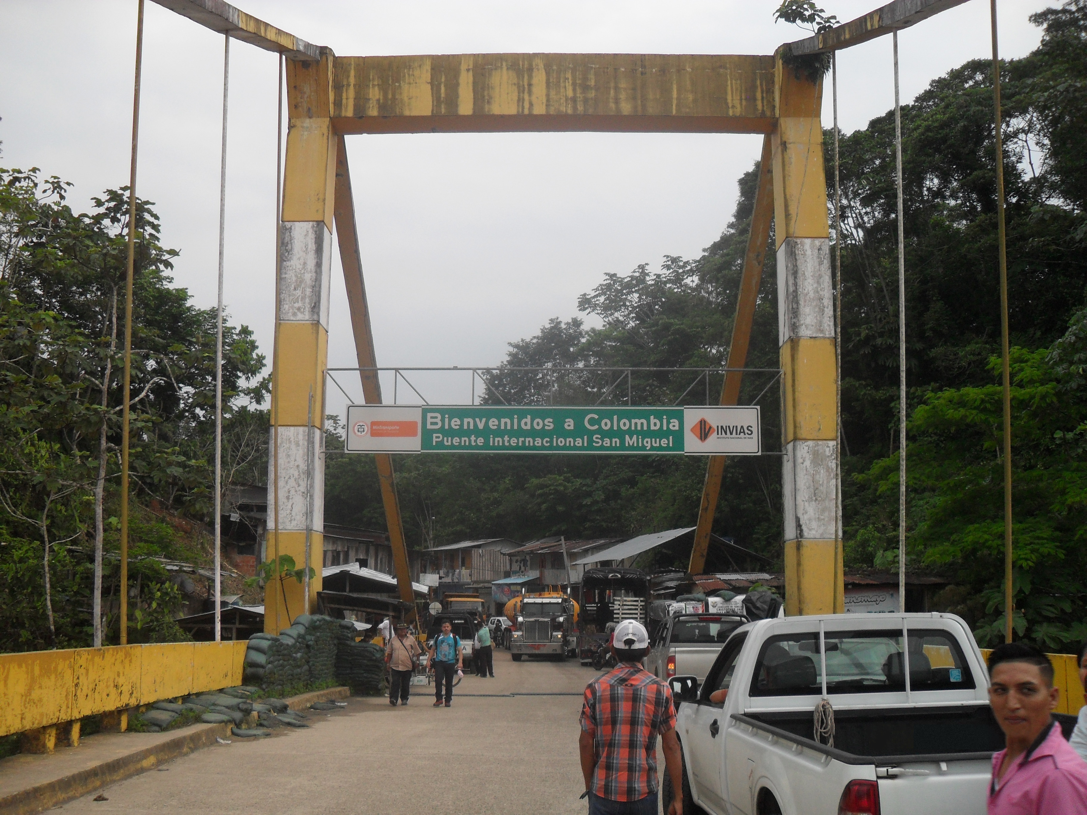 PUENTE INTERNACIONAL